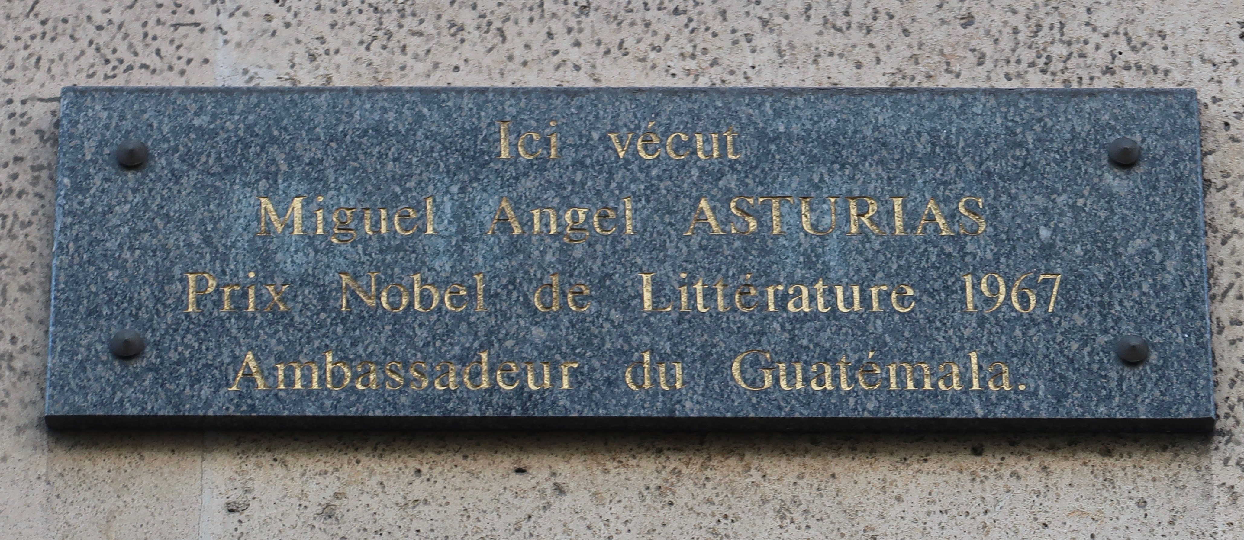 Plaque en hommage à Miguel Ángel Asturias, 73 rue de Courcelles (Paris, 8e).